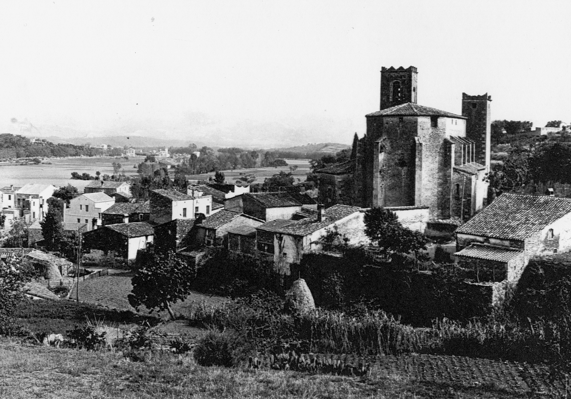 Muralla nord de Sant Pere de Vilamajor